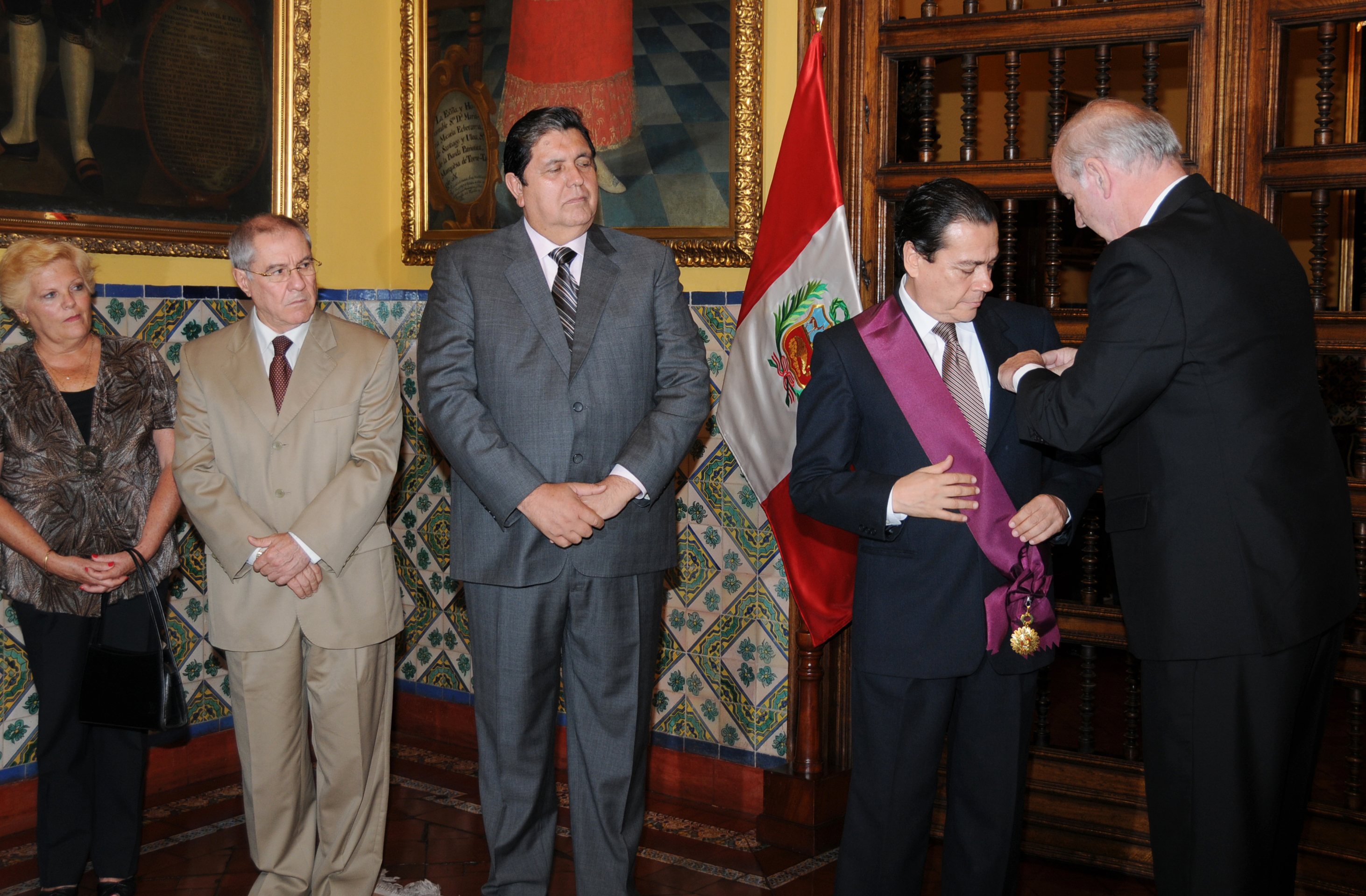 En ceremonia realizada en la Cancillería peruana, el doctor Enrique Javier Mendoza Ramírez, recibió del Ministro de Relaciones Exteriores, José A. García Belaunde, la Condecoración de la Orden “El Sol del Perú”, en el Grado de Gran Cruz.